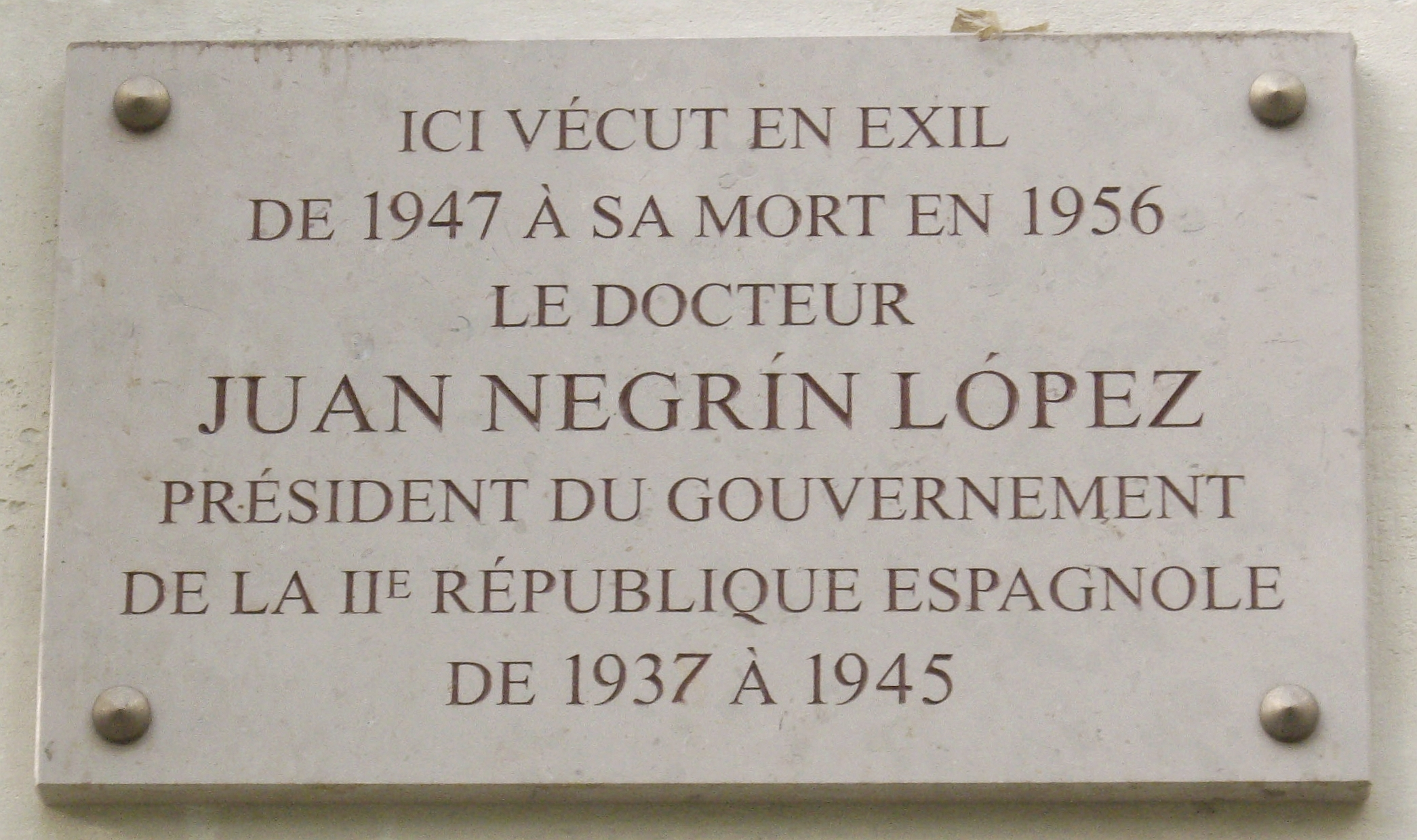 Plaque commémorative, 78 bis avenue Henri-Martin, Paris 16e.« Ici vécut en exil de 1947 jusqu'à sa mort en 1956 le docteur Juan Negrín López, président du gouvernement de la IIe République espagnole de 1937 à 1945. »